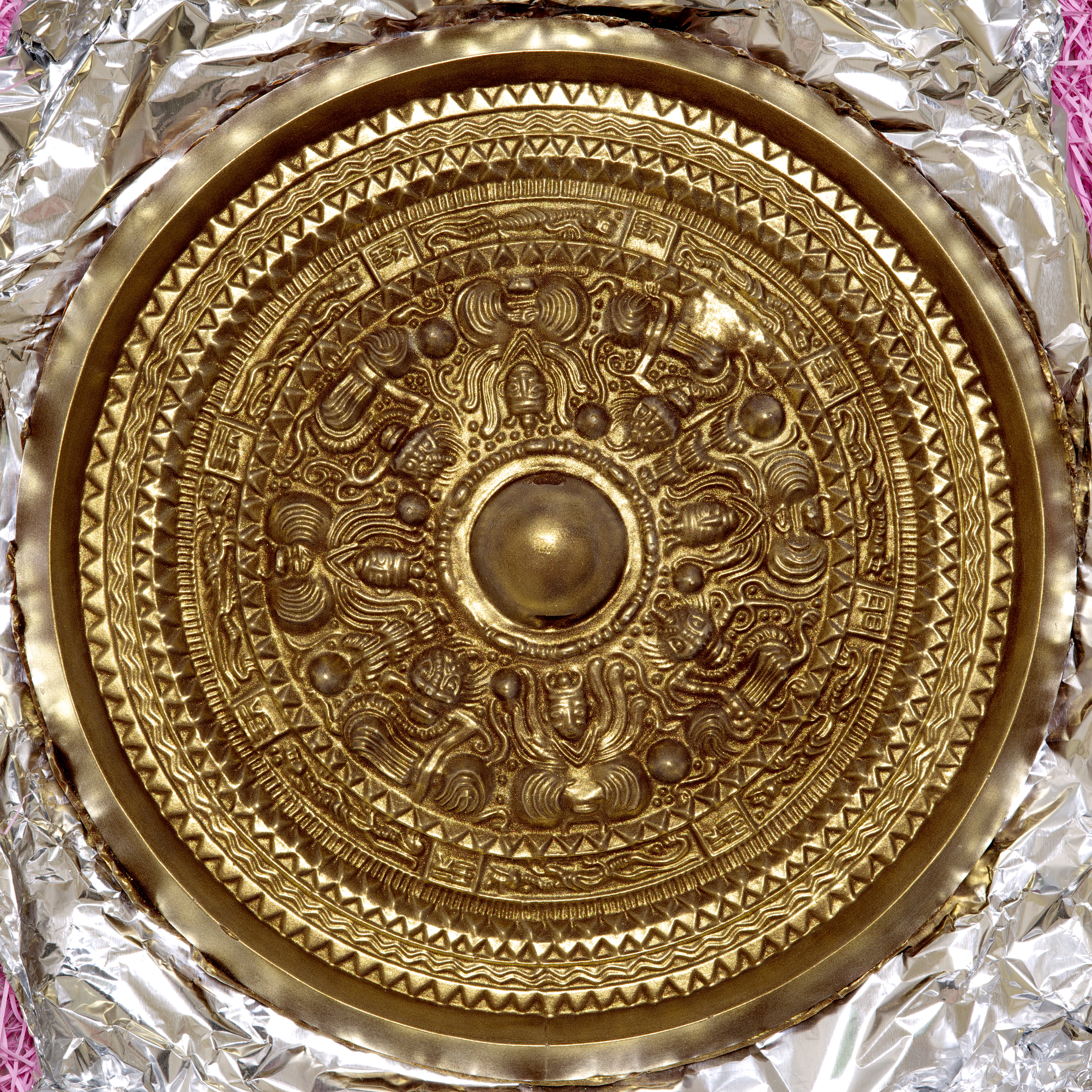 福井県福井市花野谷1号墳出土三角縁神獣鏡のレプリカ。チョコレート製。パールパウダー仕上げ。